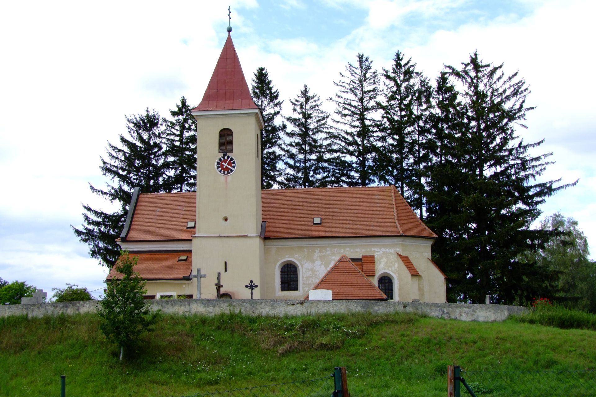 Kath. Filialkirche hll. Petrus und Paulus